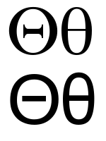 greek letter theta